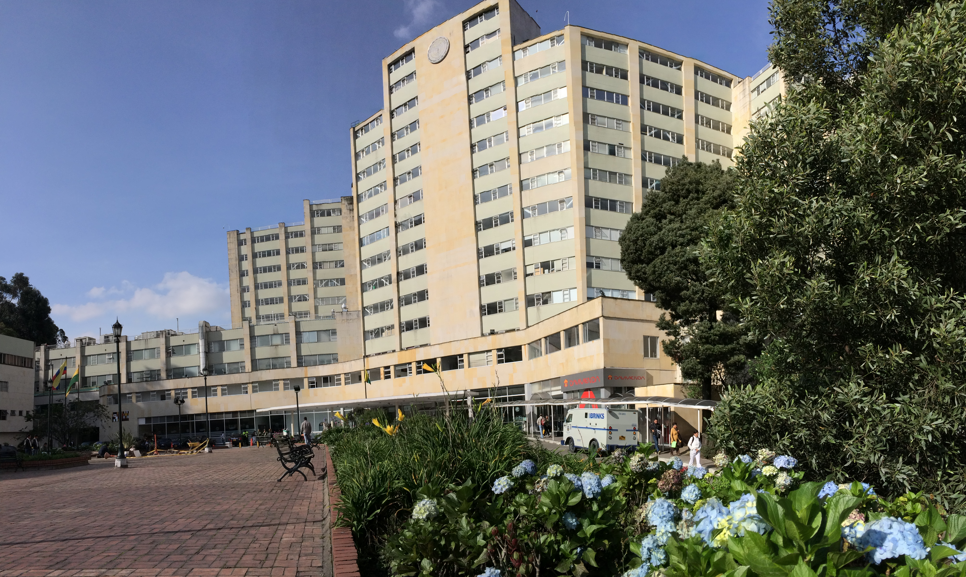 Hospital Militar, Bogotá, Colombia